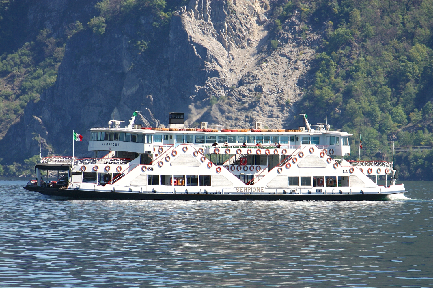 Traghetto M/N Sempione construit en 1976, naviguant sur le lac Majeur en 2014.